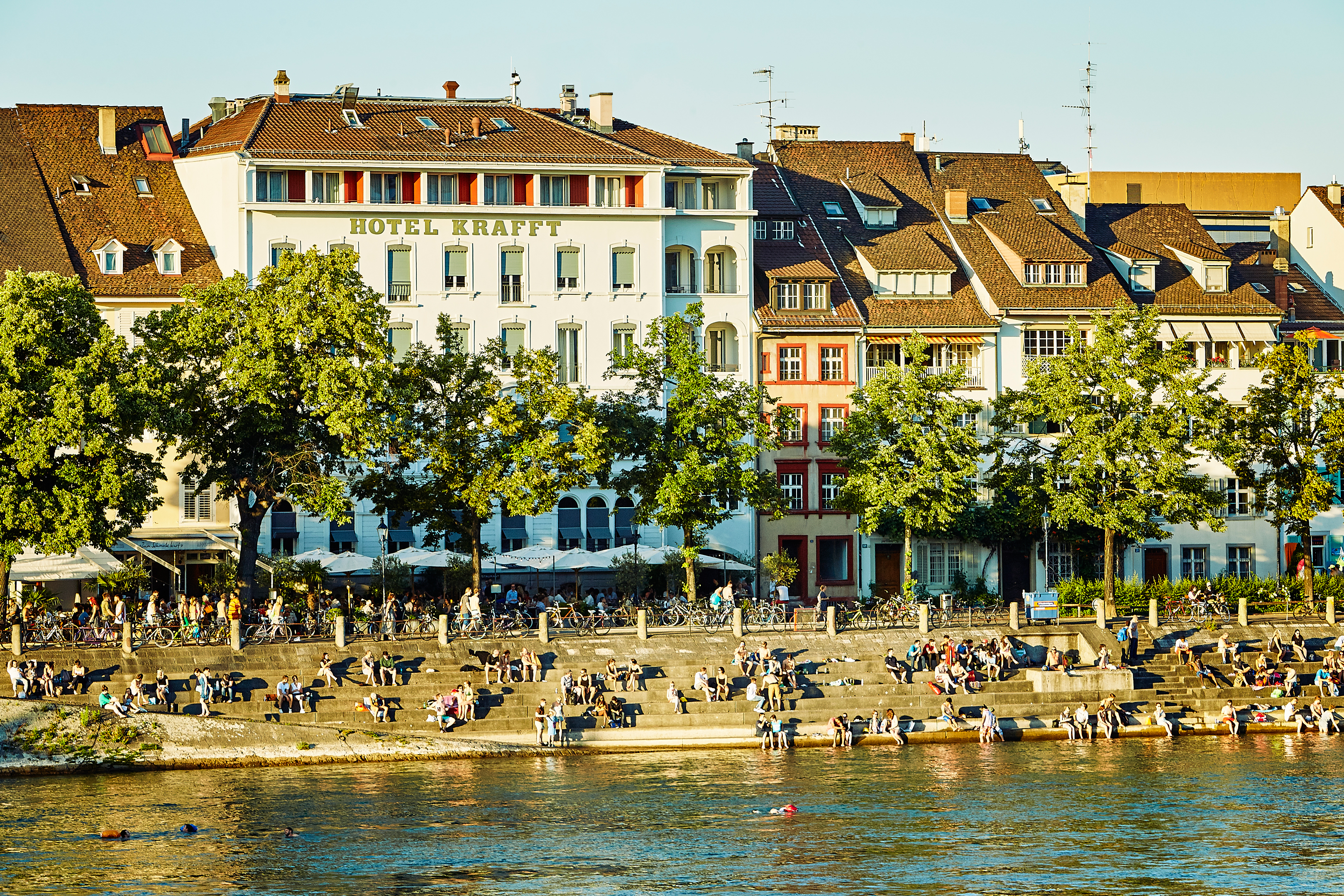 Aussenfassade des Krafft Basel direkt am Rhein.